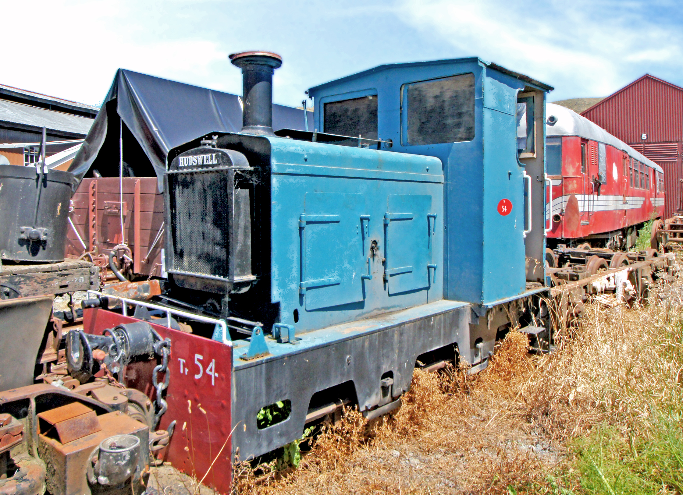 Tr 54 Hudswell, Clarke